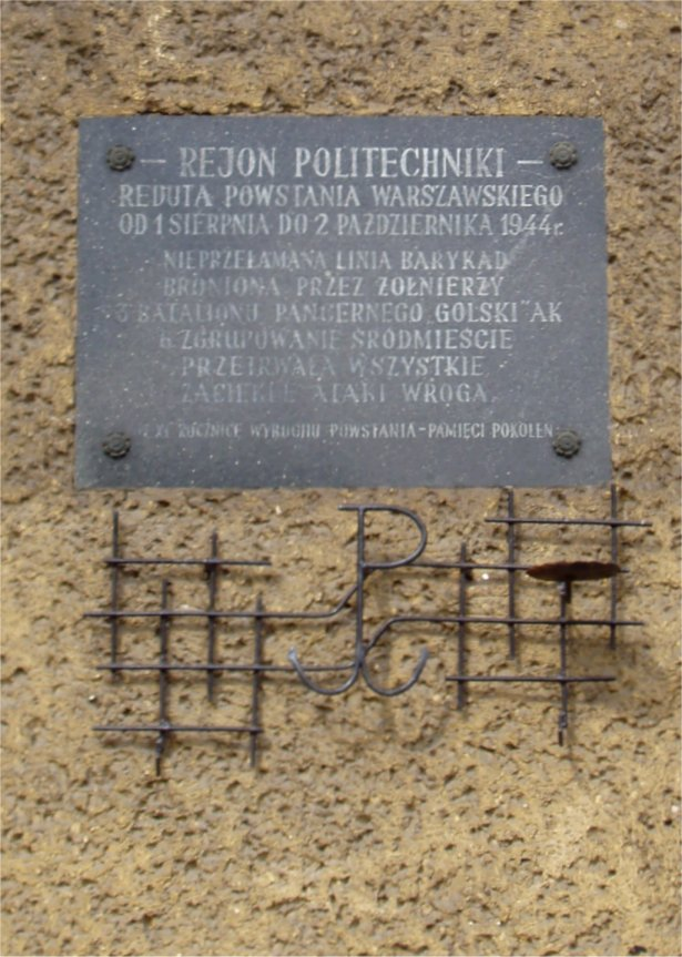 Rejon Politechniki Warszawskiej (fot Zu)